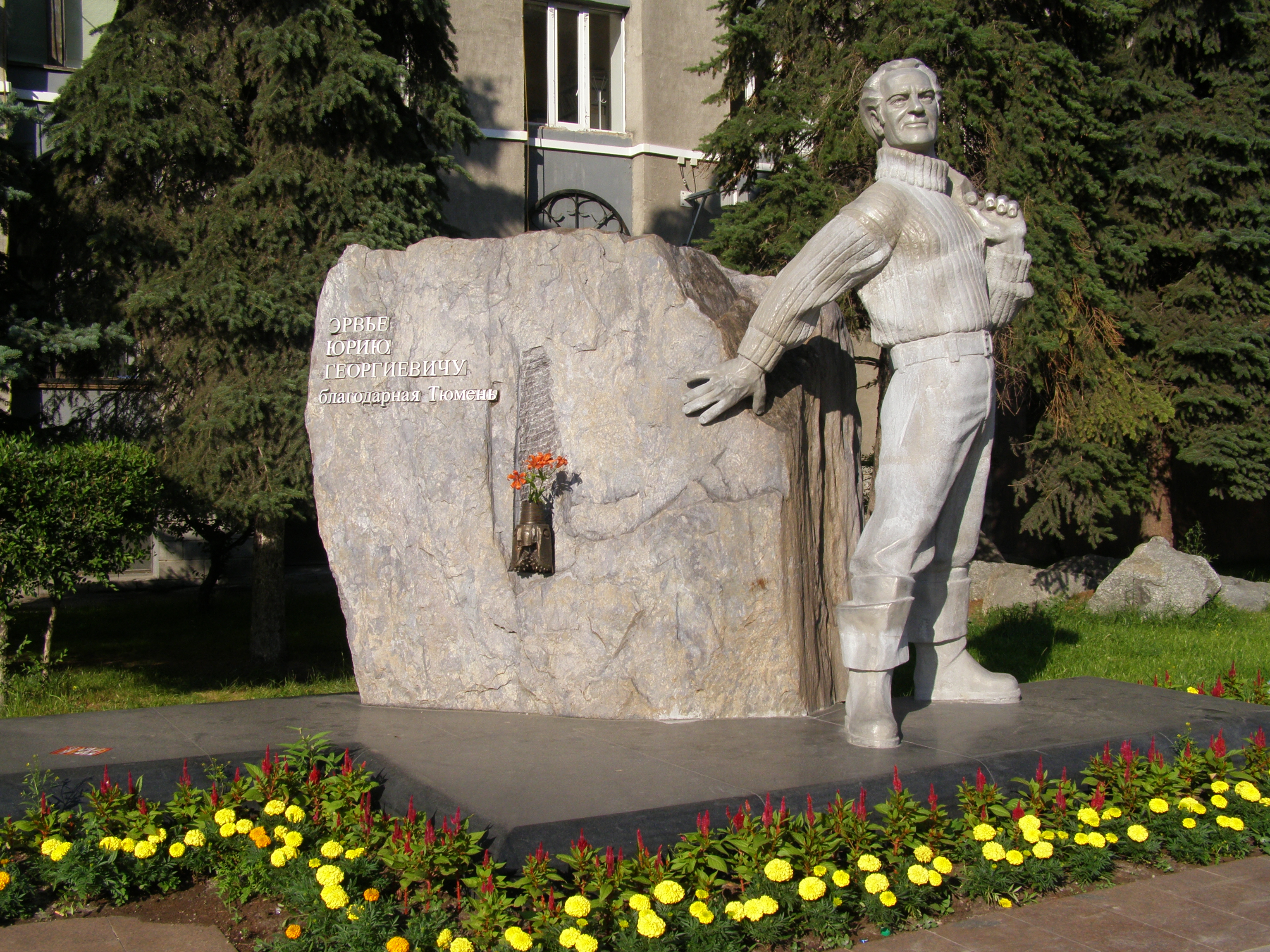 Statuo de Jurij-Raul Ervje. Tjumeno, Rusio.